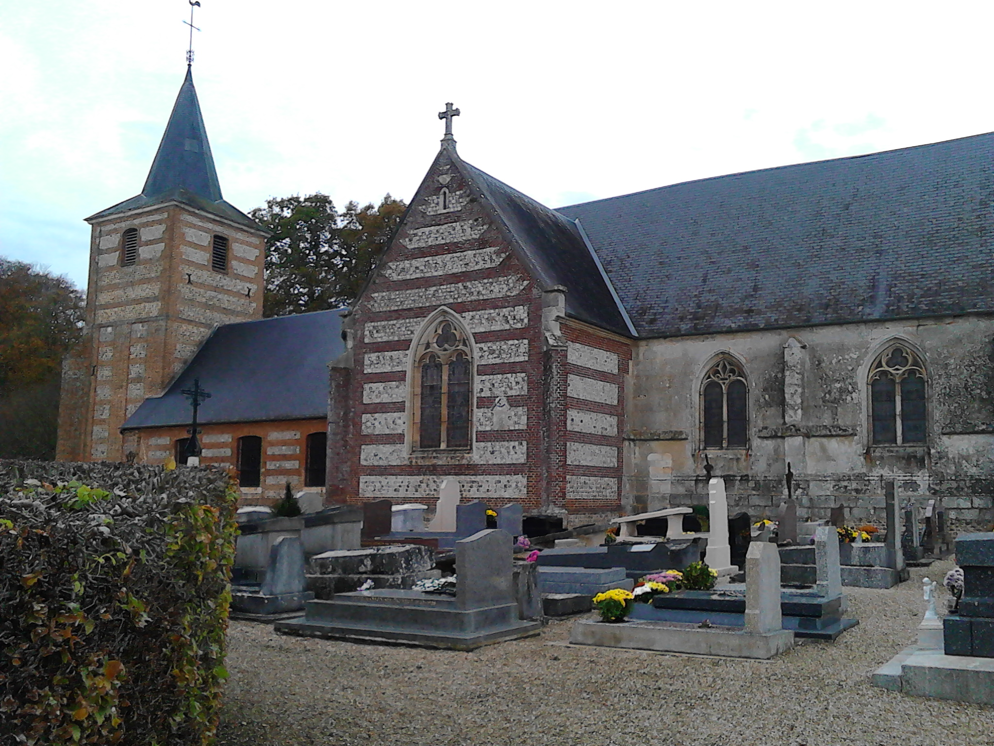 Église Saint-Vaast à Thiouville (76)